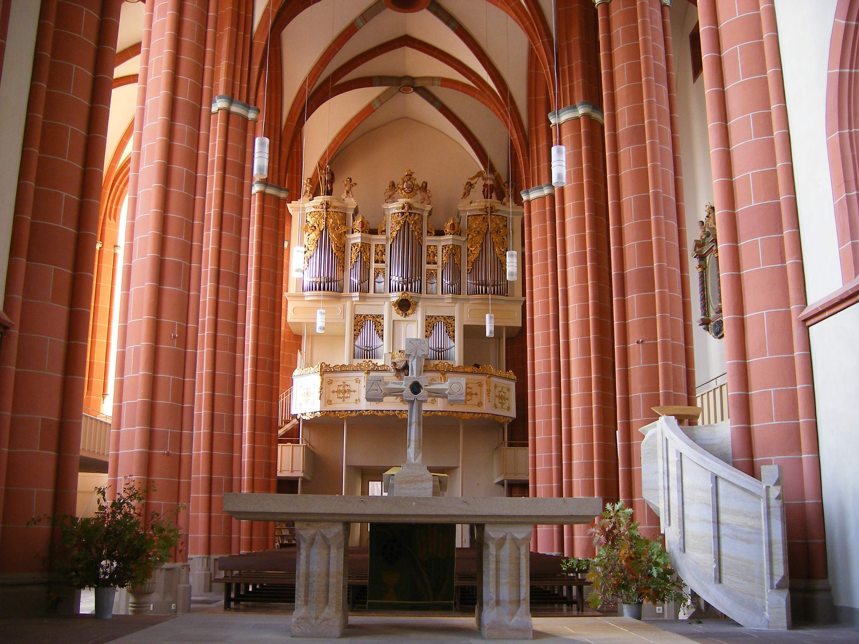 Blick auf die Orgel